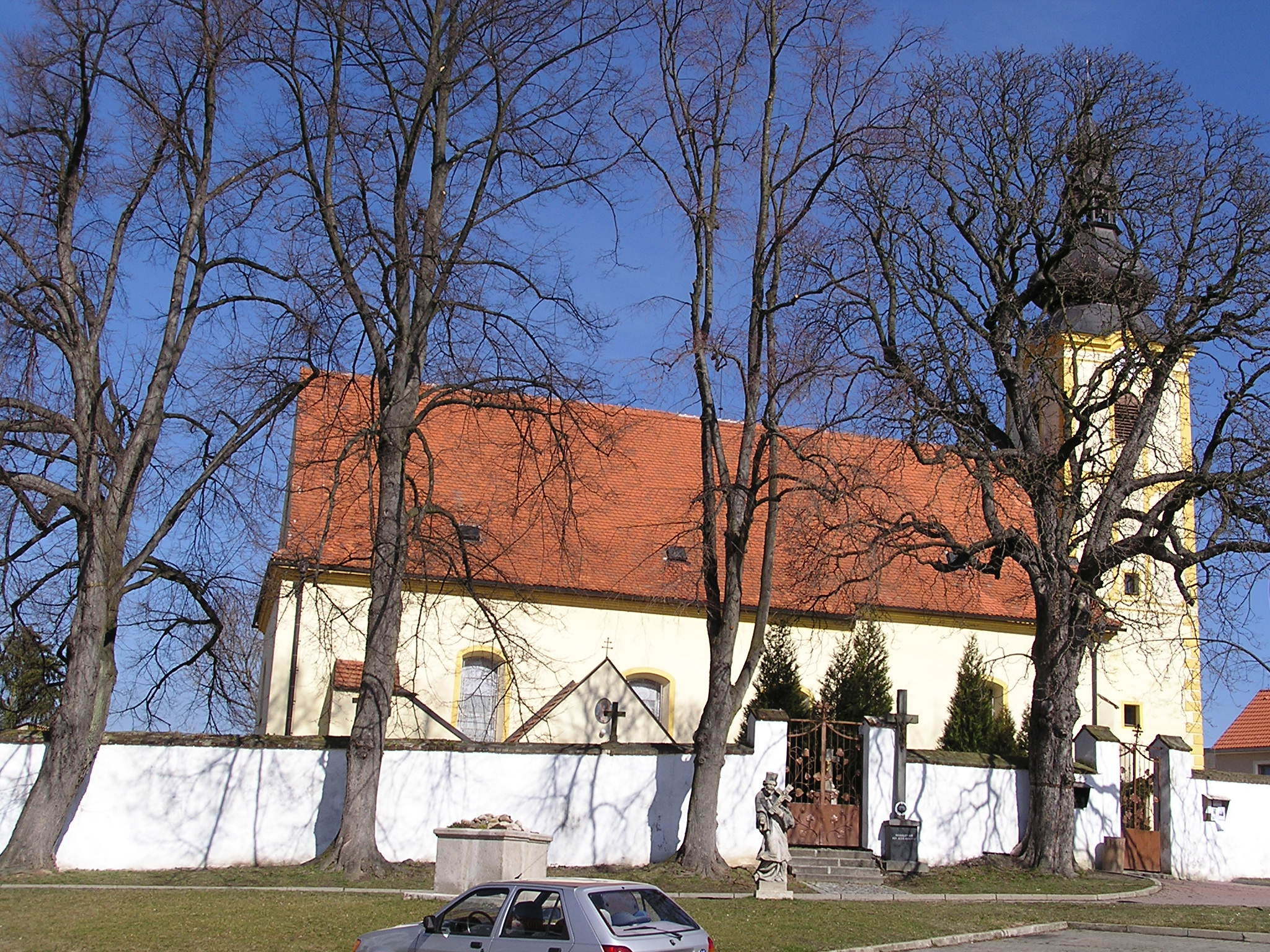 Kostel sv. Vavřince v Ledenicích.